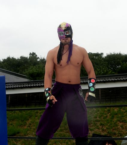 MASAMURE